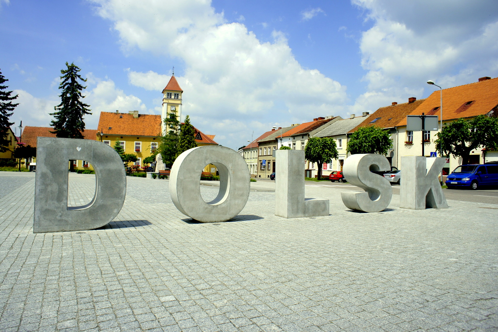 Dolsk, powiat śremski w Wielkopolsce. Rynek i ratusz.